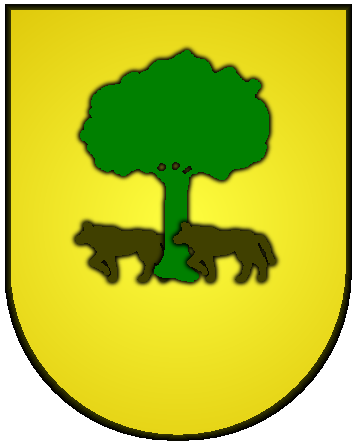 Escudo desconocido, sin referencias Diseñado con Paint Shop Pro 7.